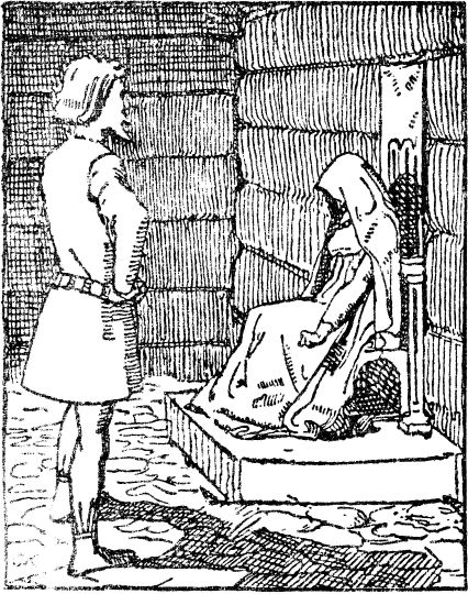 Christian Krogh: Illustration for Håkon den godes saga, Heimskringla 1899-edition. nn: «Gunnhild får bod om at Eirik er fallen.» nb: «Gunnhild får bud om Eiriks død.»